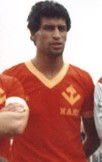 Mahmoud Guendouz footballeur international et entraîneur algérien